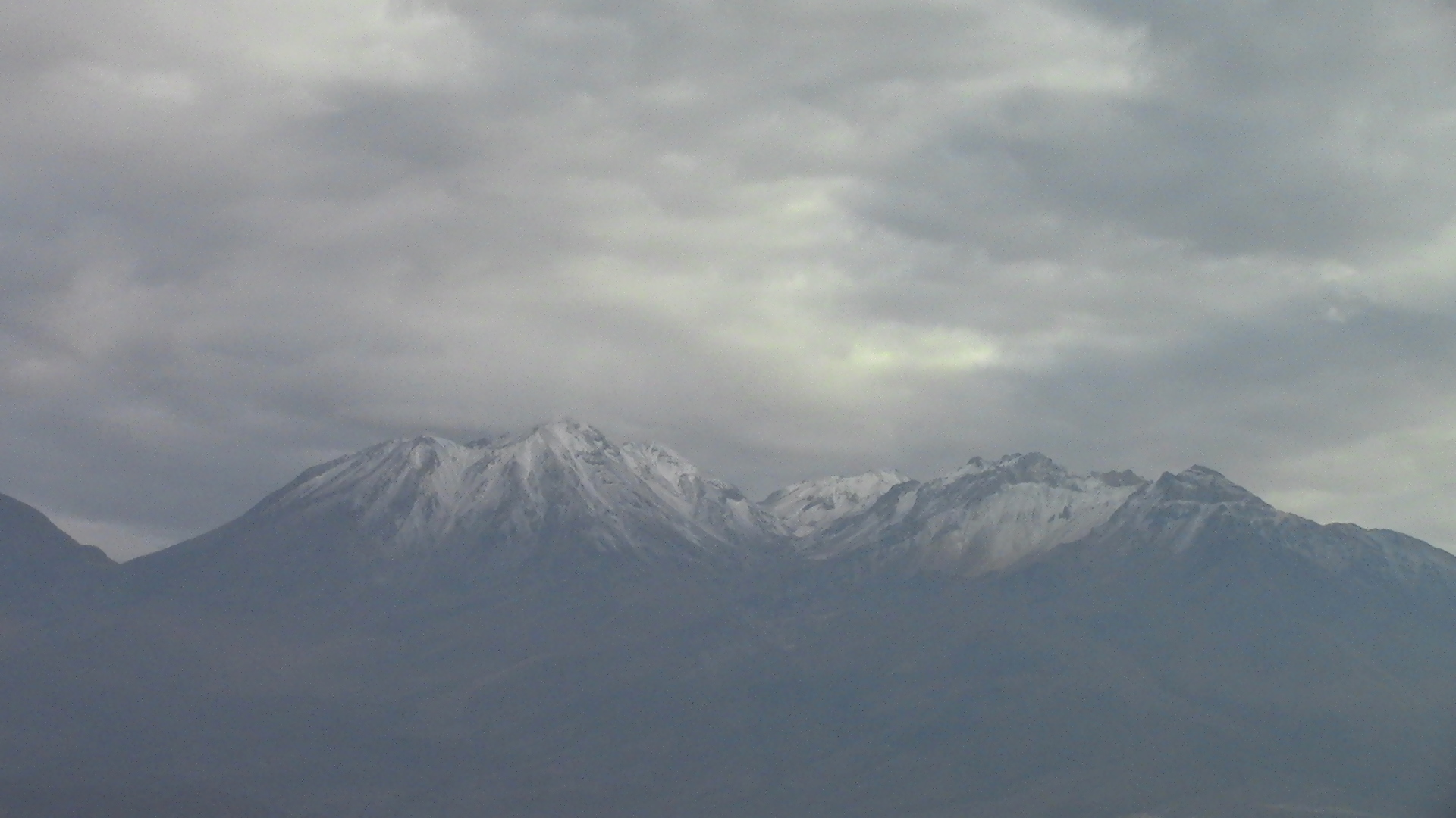 volcan chachani primavera